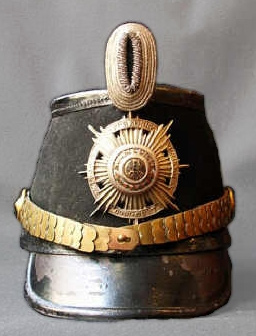 Um 1905. In der Sammlung des Berliner Zeughauses 1991 fotografiert.